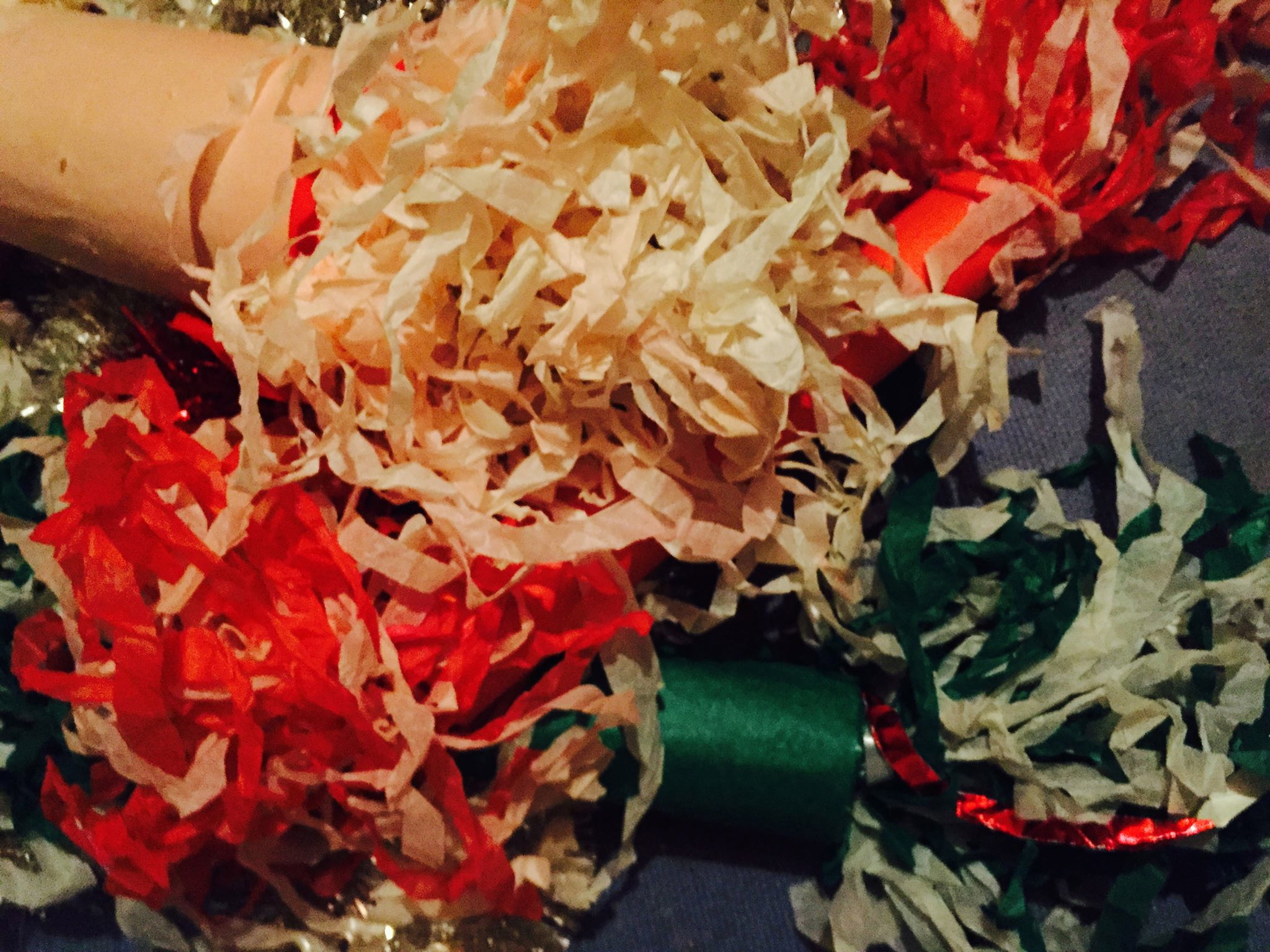 Traditionella smällkarameller